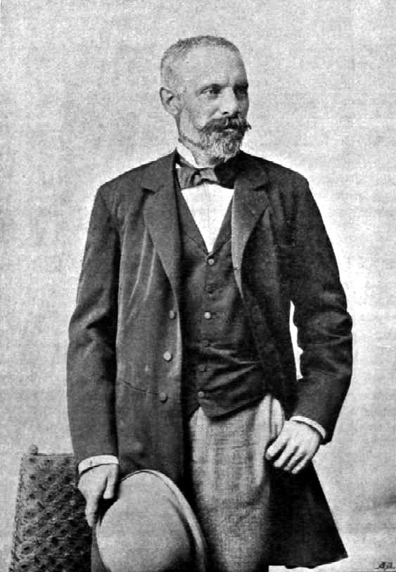 Plósz Sándor (1846–1925) jogász, egyetemi tanár, politikus, miniszter, a Magyar Tudományos Akadémia rendes, majd tiszteleti tagja. Ellinger Ede fényképfelvétele